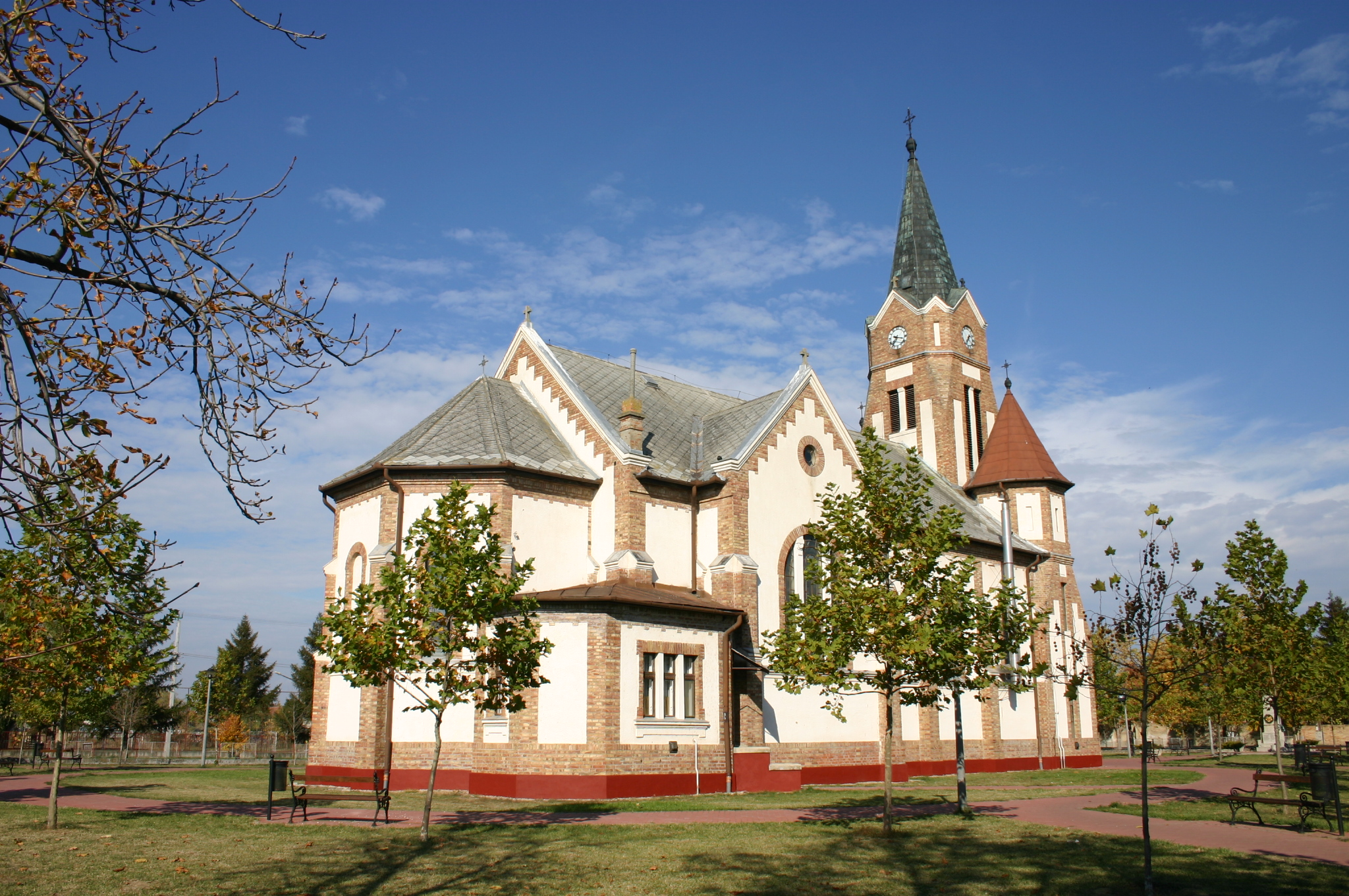 Páduai Szent Antal római katolikus templom, Tiszasziget, Hungary